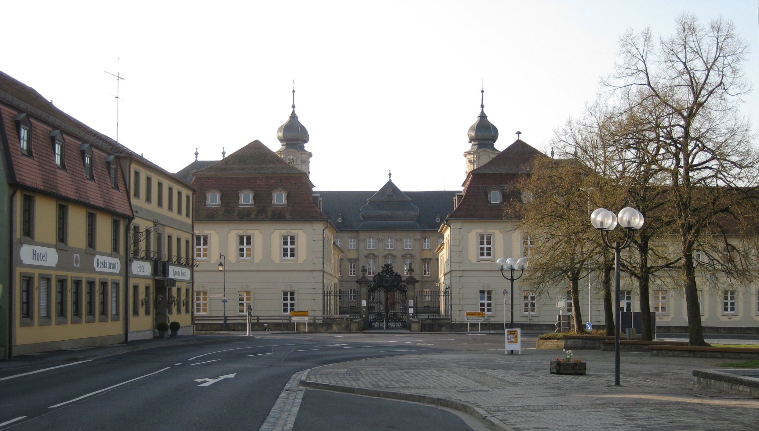 Schloss Werneck, Bayern, Deutschland. Ansicht vom Balthasar-Neumann-Platz vor der Umgestaltung Werneck castle, Bavaria, Germany. View from Werneck Balthasar-Neumann-place